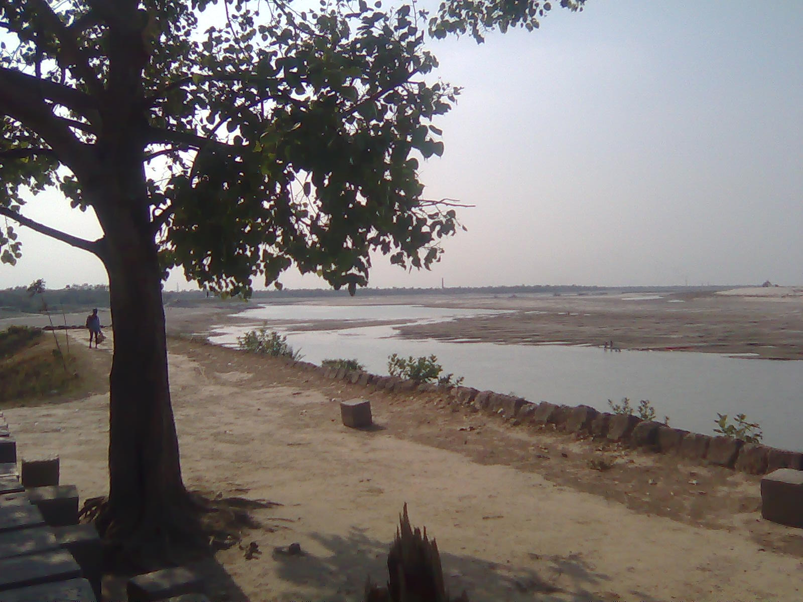 gorai river, kushtia